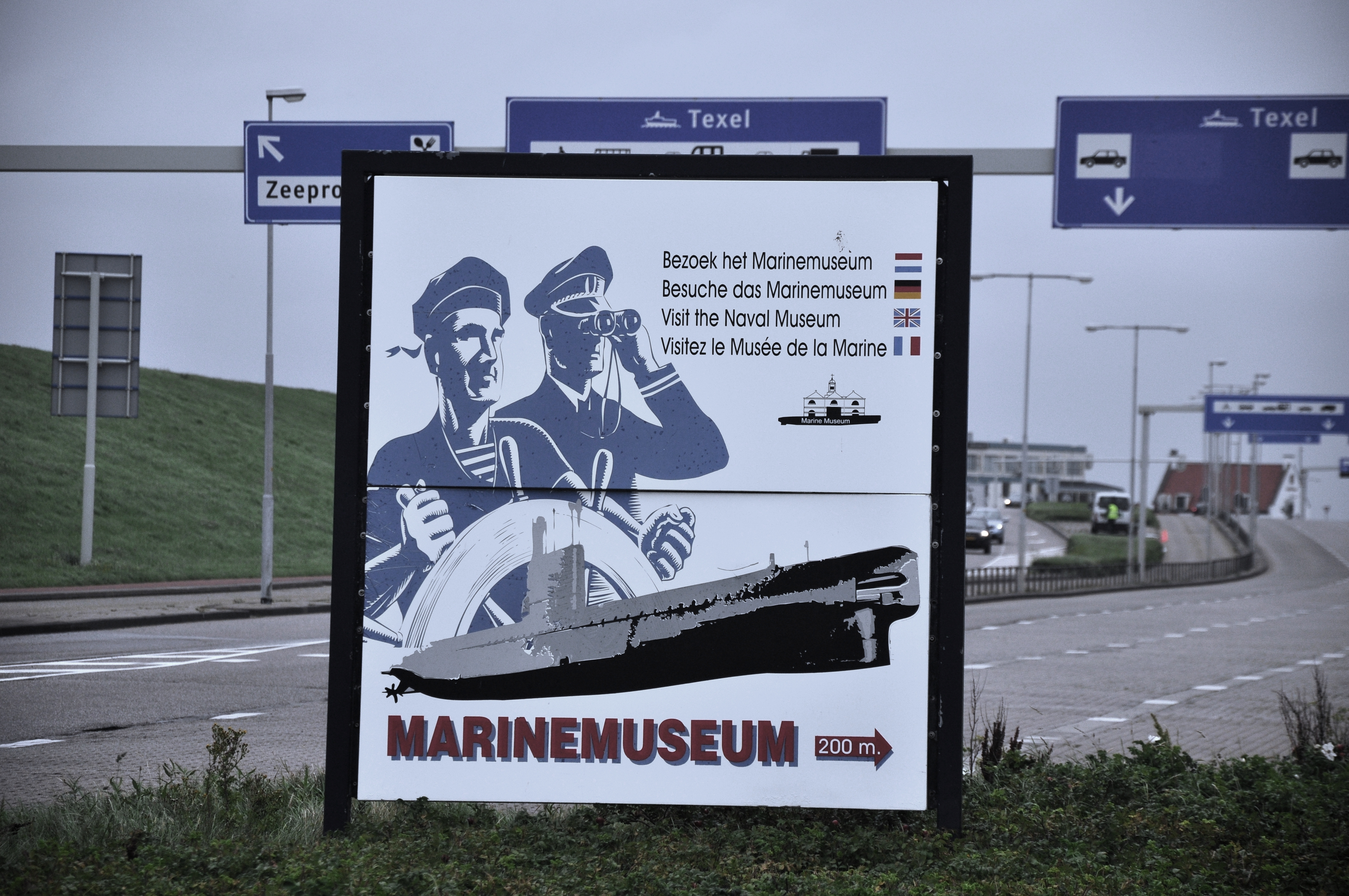 Holland, Den Helder, Marinemuseum